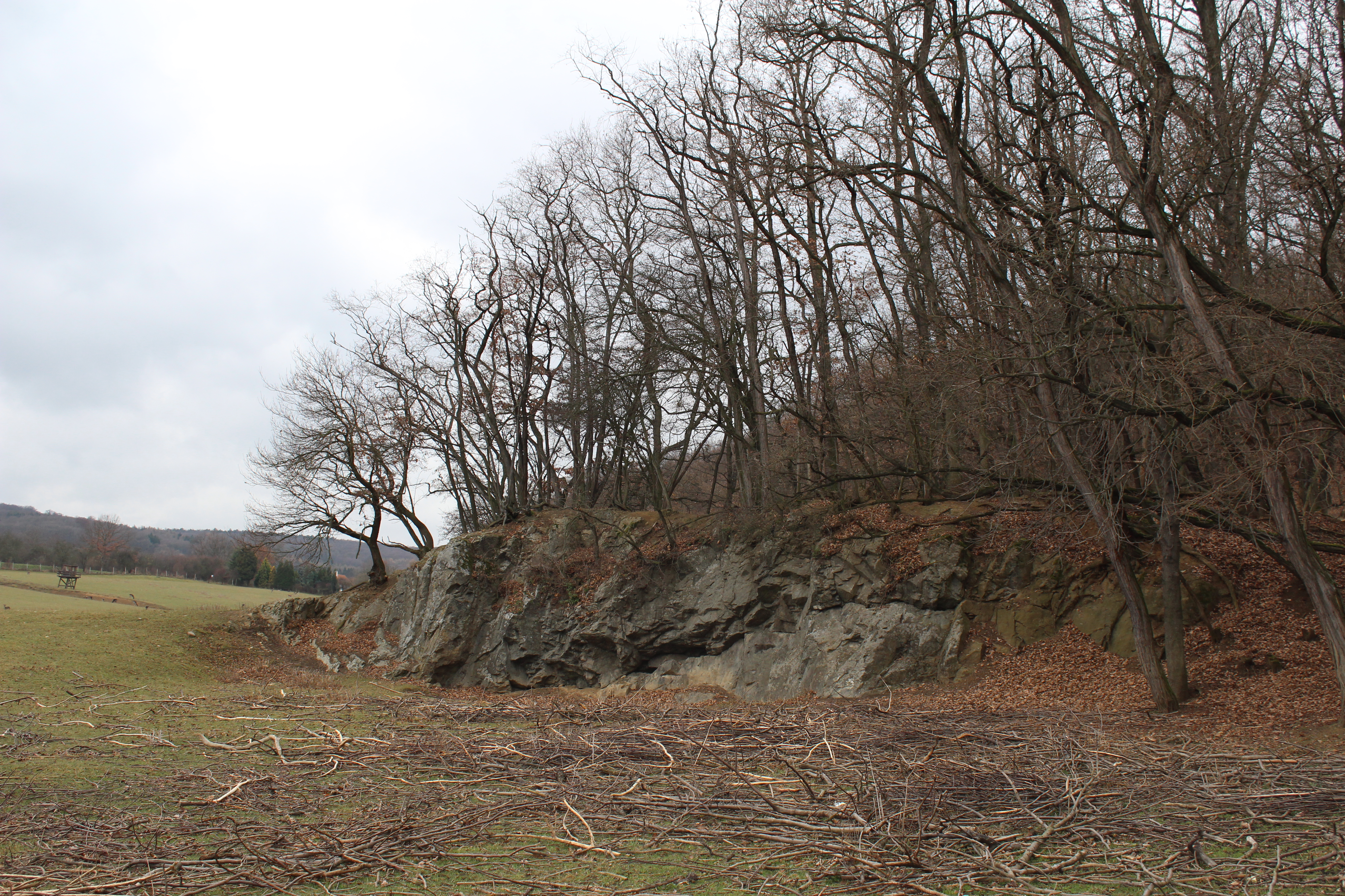 Pohled na skalní útvar Babka klevetilka Pověst o babce klevetilce na Naučné stezce Liteň u Obory Pod Cihelnou. Snímek vznikl na chráněném pracovním místě fotograf - pracovník pro dokumentaci vytvořeném společností Atelier Svatopluk, o.p.s. Liteň s podporou Úřadu práce ČR, krajská pobočka pro Středočeský kraj v Příbrami, kontaktní pracoviště v Berouně Jan Maňák